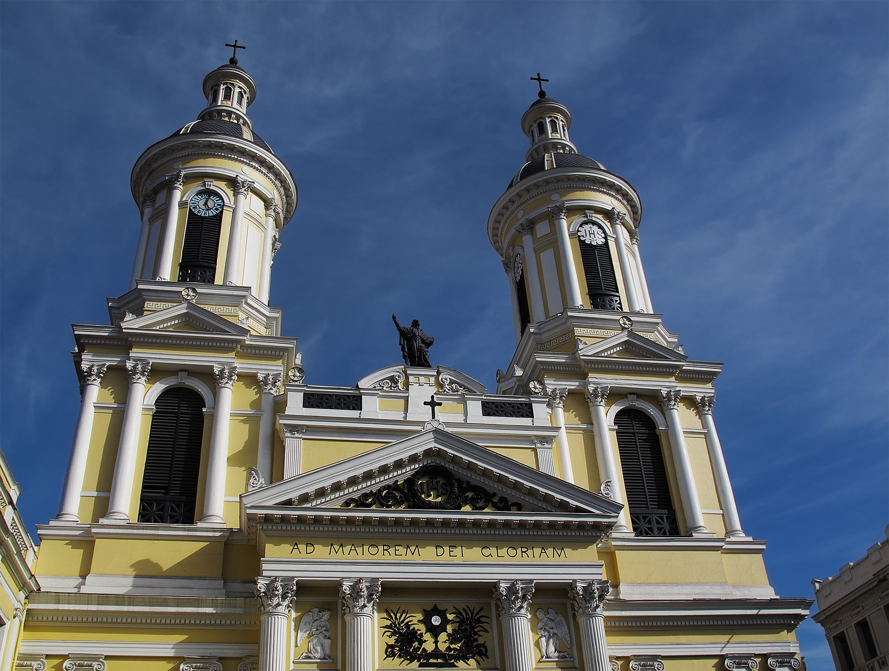 Iglesia de San Ignacio This is a photo of a national monument in Chile: 504